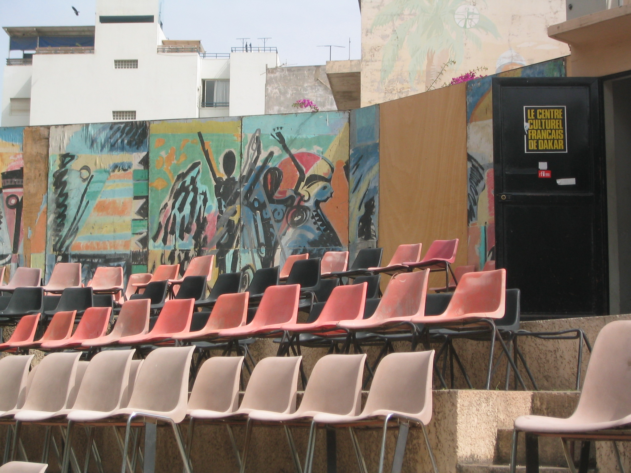 Le cinéma de plein air du Centre culturel français de Dakar